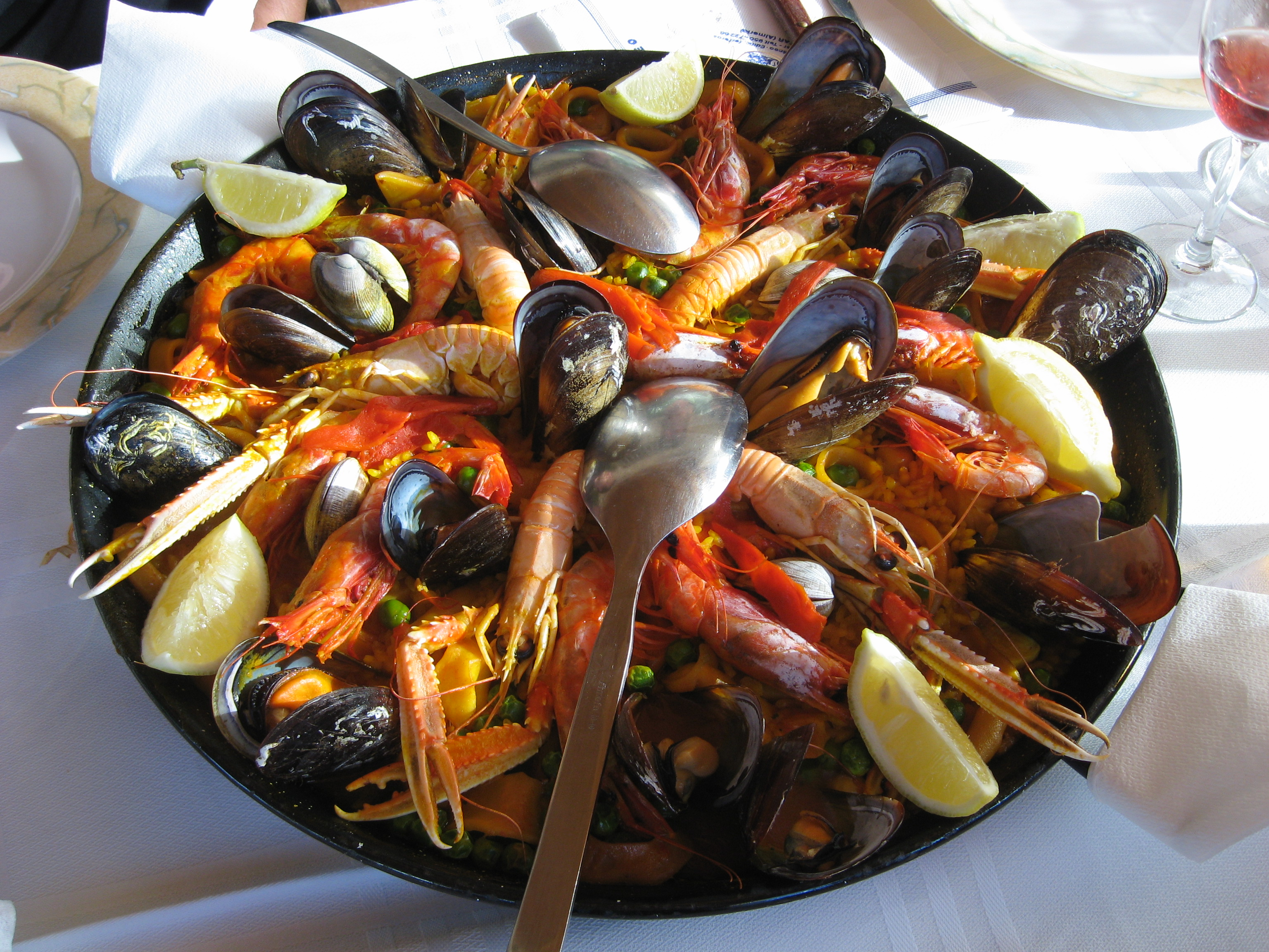 Paella Marinara